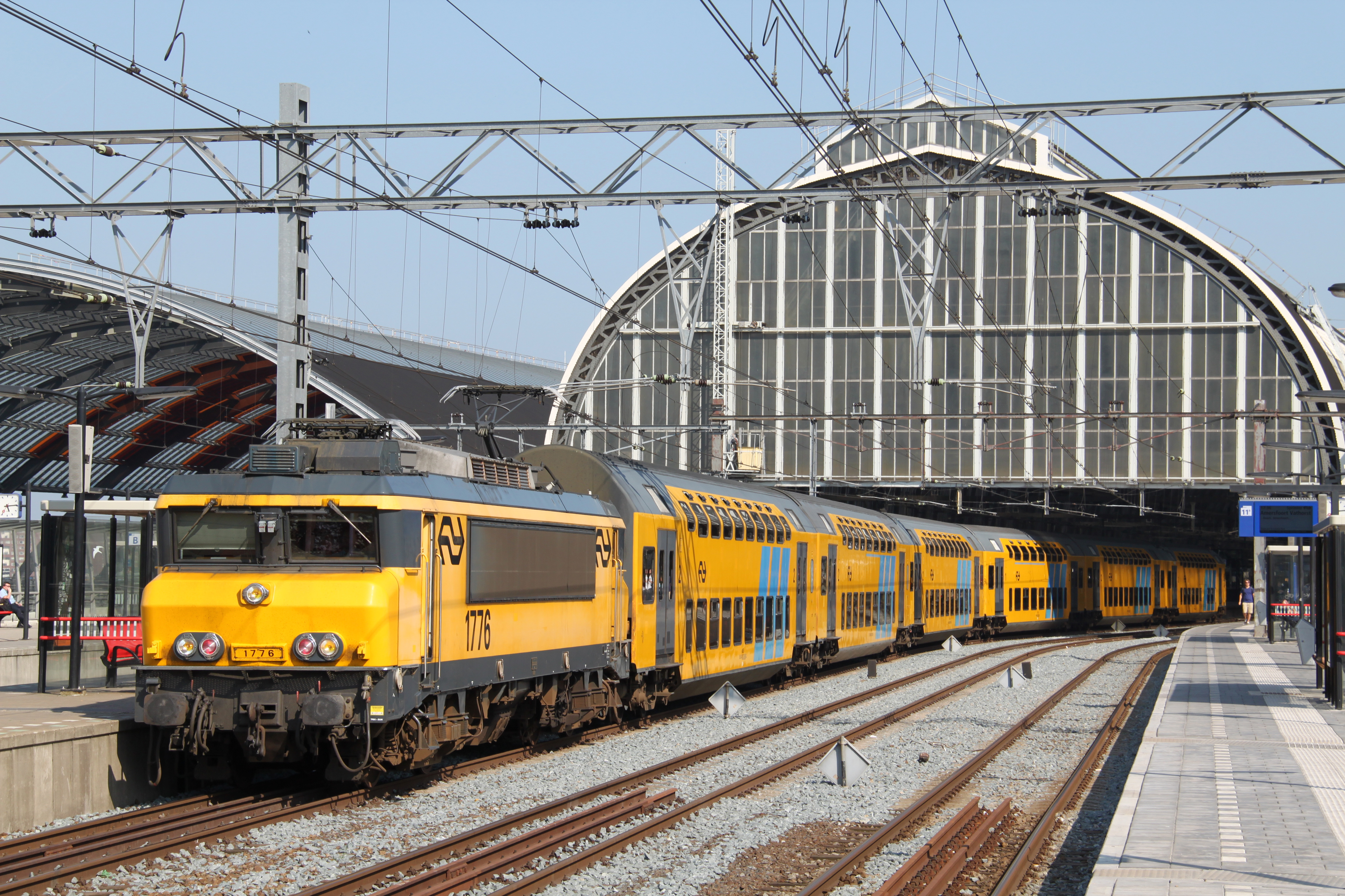 Een DDM-stam getrokken door een locomotief serie 1700 op station Amsterdam Centraal in de middagspits, wachtend op vertrek naar Enkhuizen.